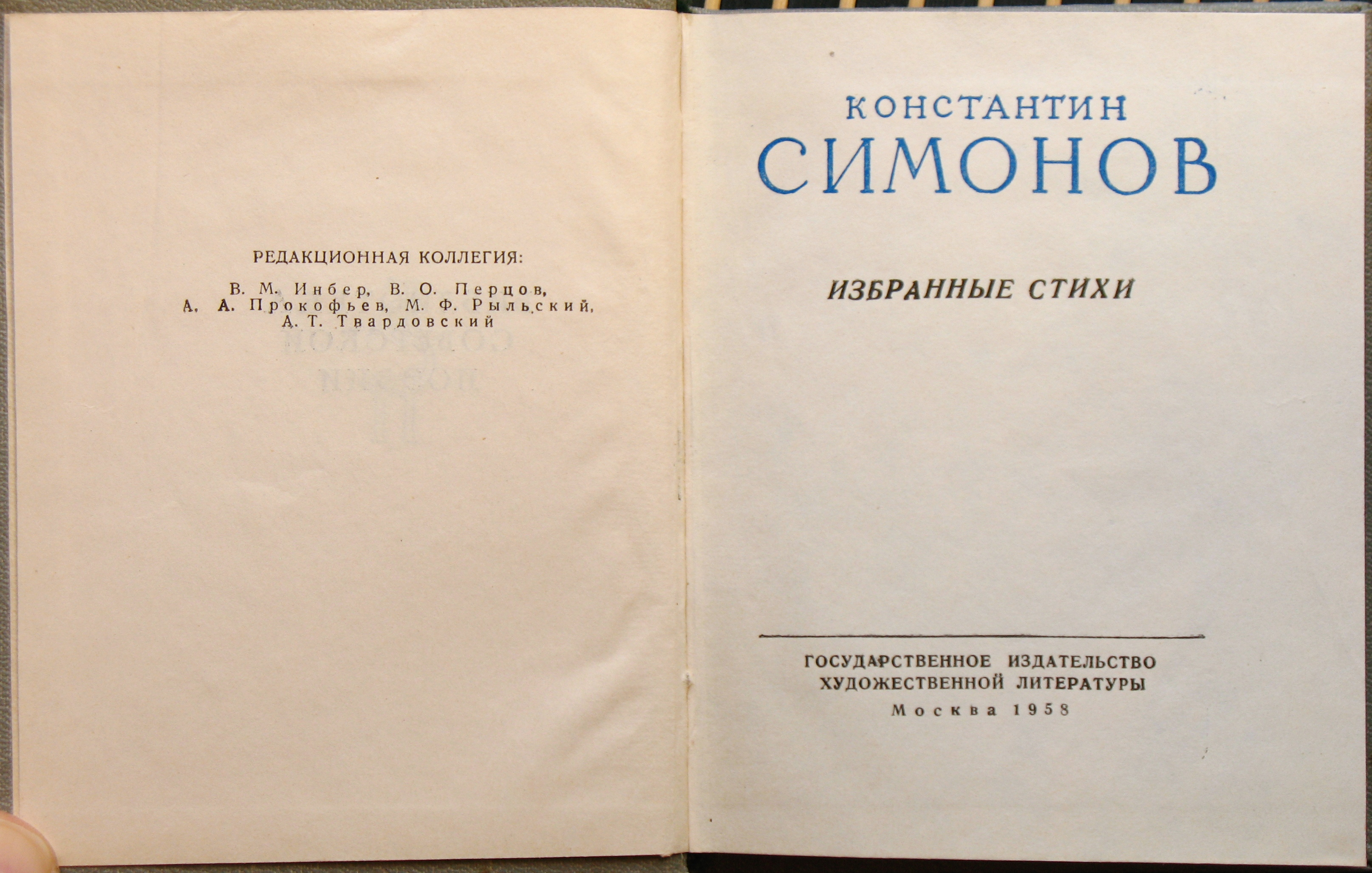 Konstantin Simonov book.